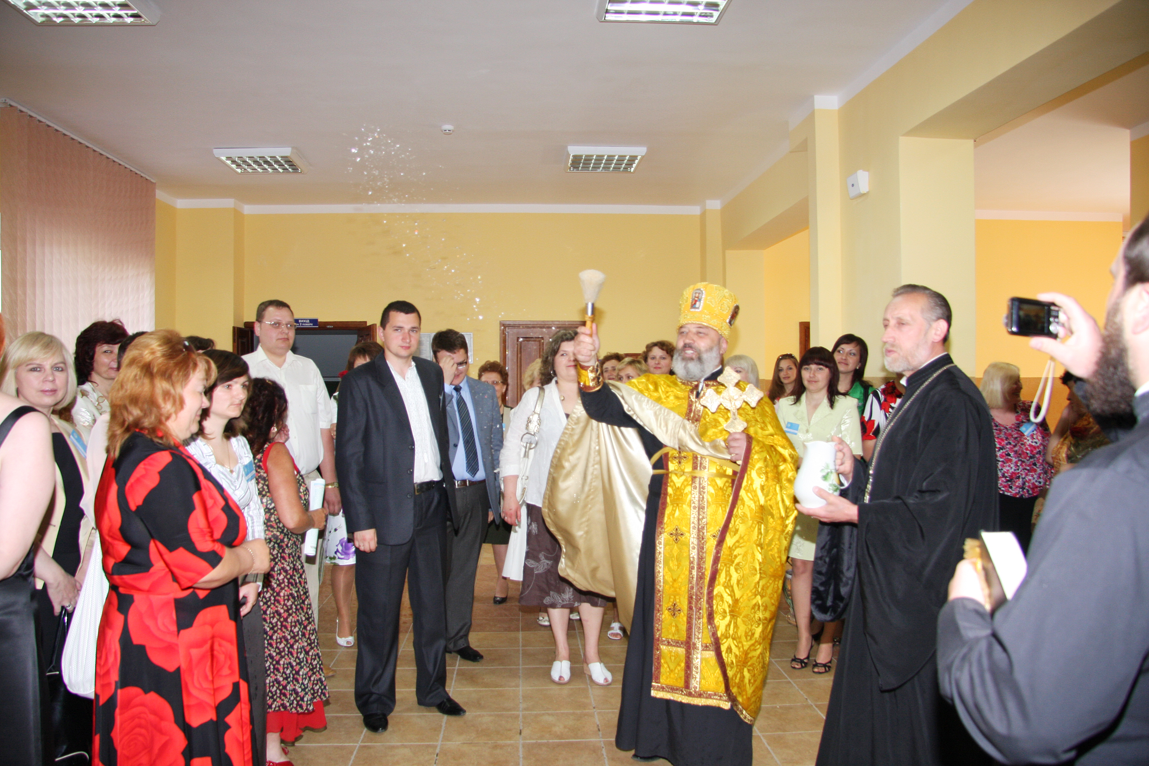 Освячуєм бібліотечну святиню